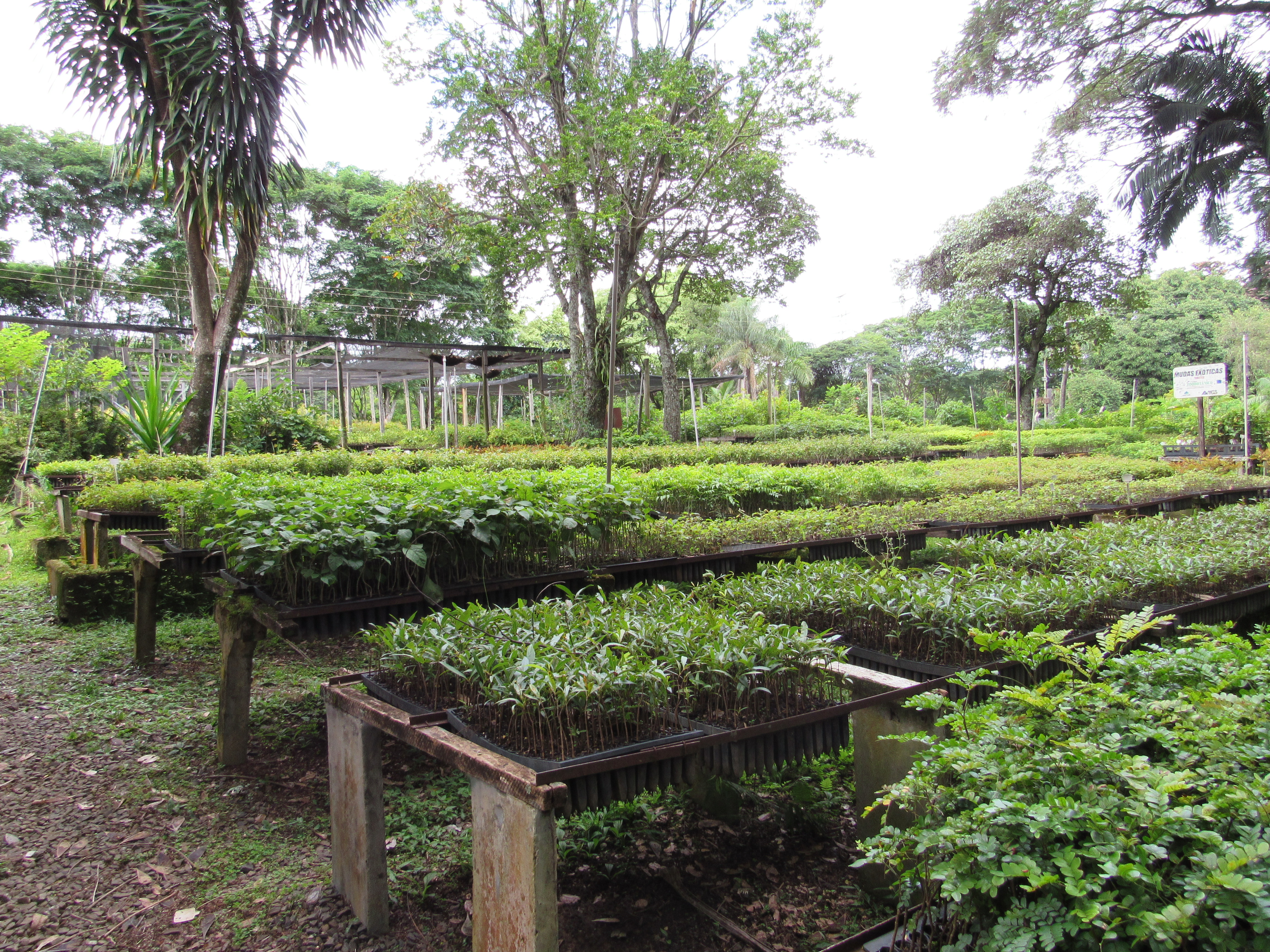 Jardim Zoobotanico de Franca